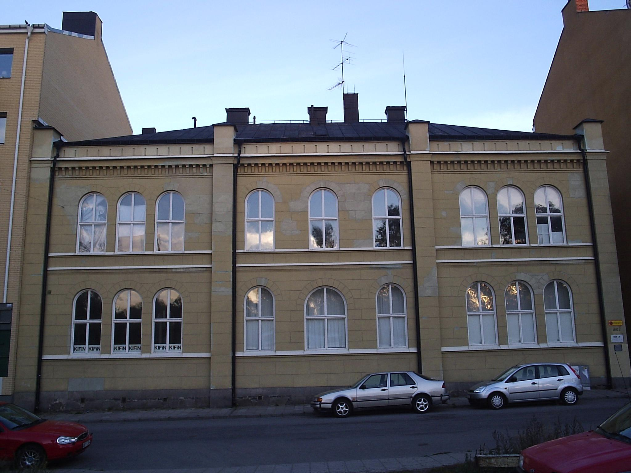 Berzeliusskolan i Norrköping, oktober 2005. Fotograferad av Harri Blomberg.